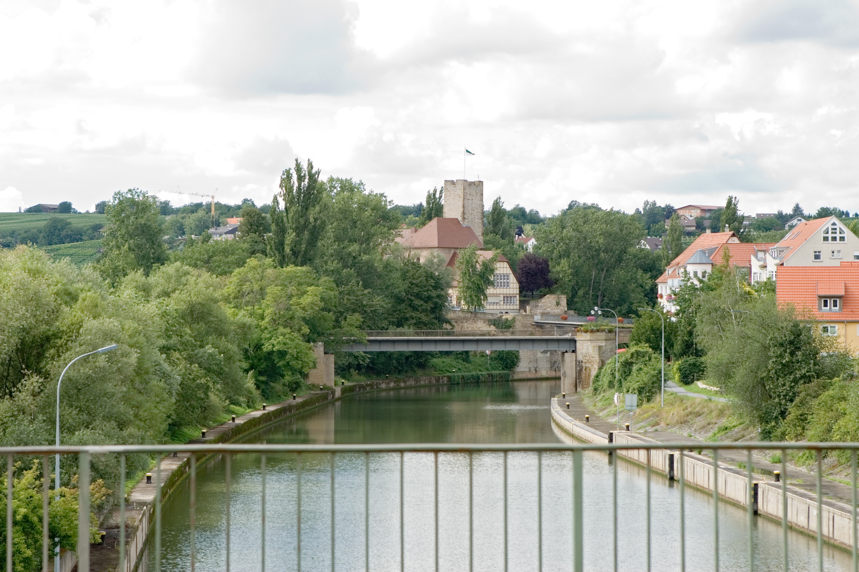 Die Burg in Lauffen. Auf dem Bild sind alle 3 Brücken von Lauffen zu sehen.